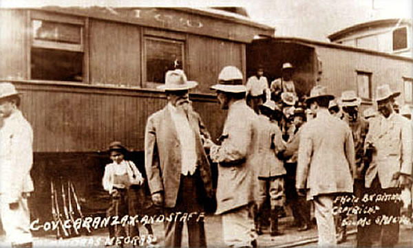 Venustiano Carranza llegando a Piedras Negras por ferrocarril en 1915. Manuel Velez